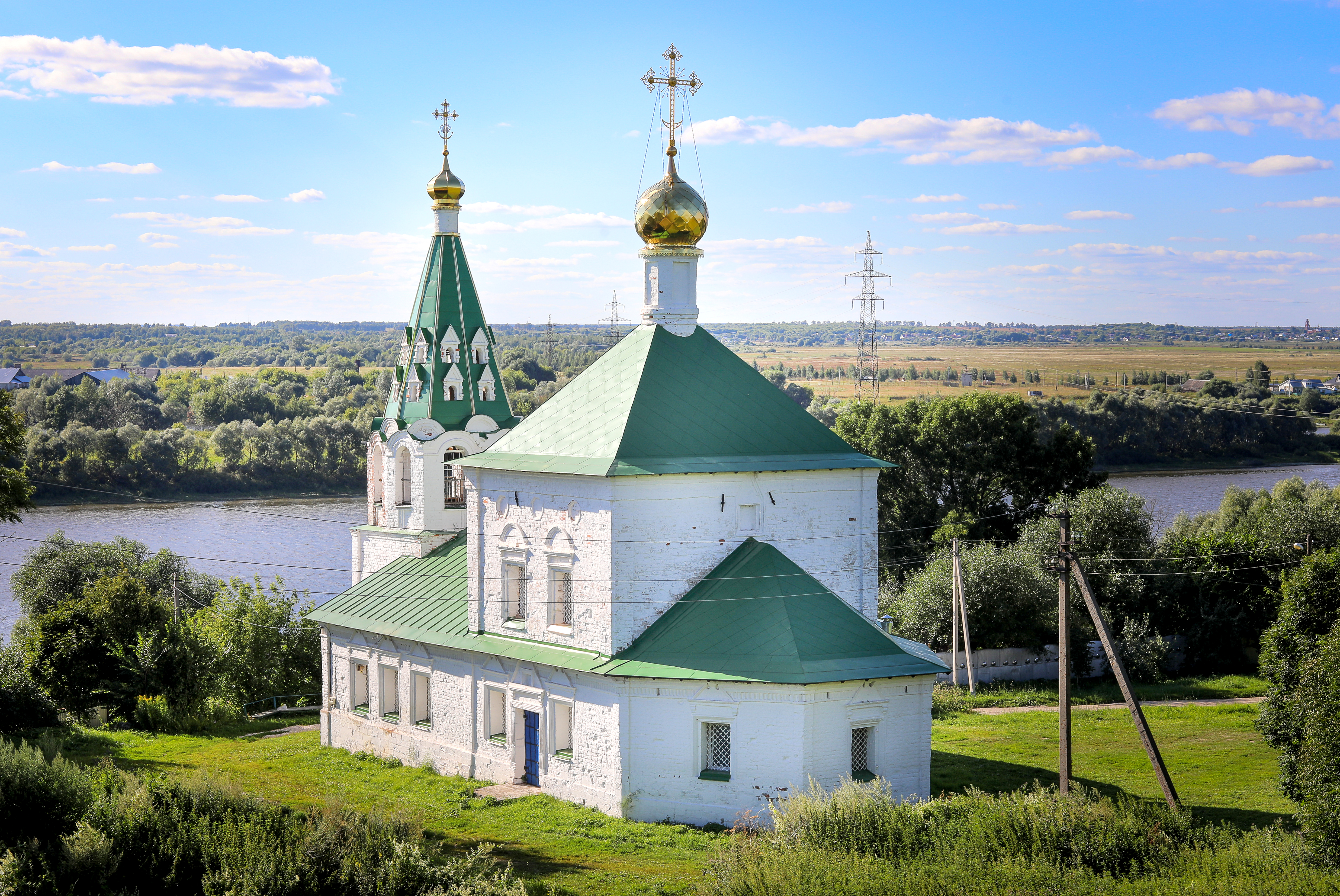 Храм в честь Преображения Господня. Село Старая Рязань, Рязанская область, Спасский район.